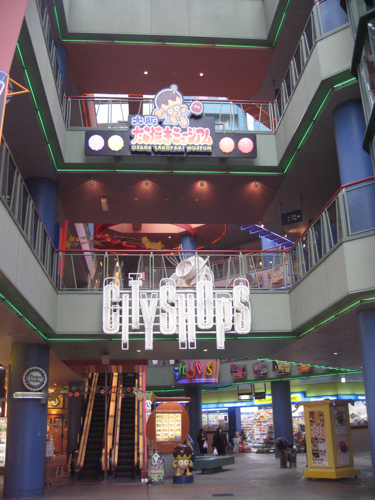 Universal CityWalk Osaka, Osaka, Kansai Region.